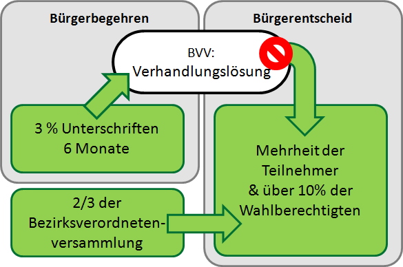 Verfahren der Büergergesetzgebung (Bezirksebene) im Land Berlin